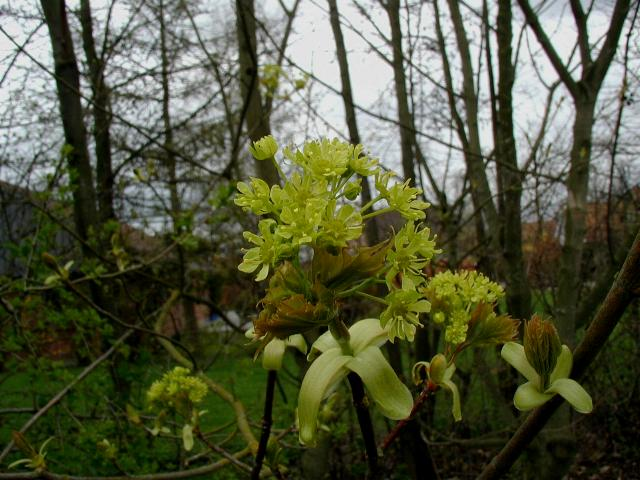 Acer platanoides